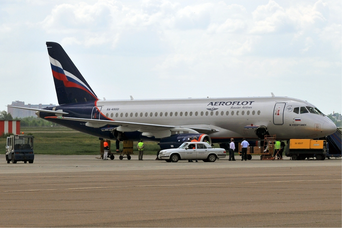 Aeroflot Sukhoi SuperJet 100